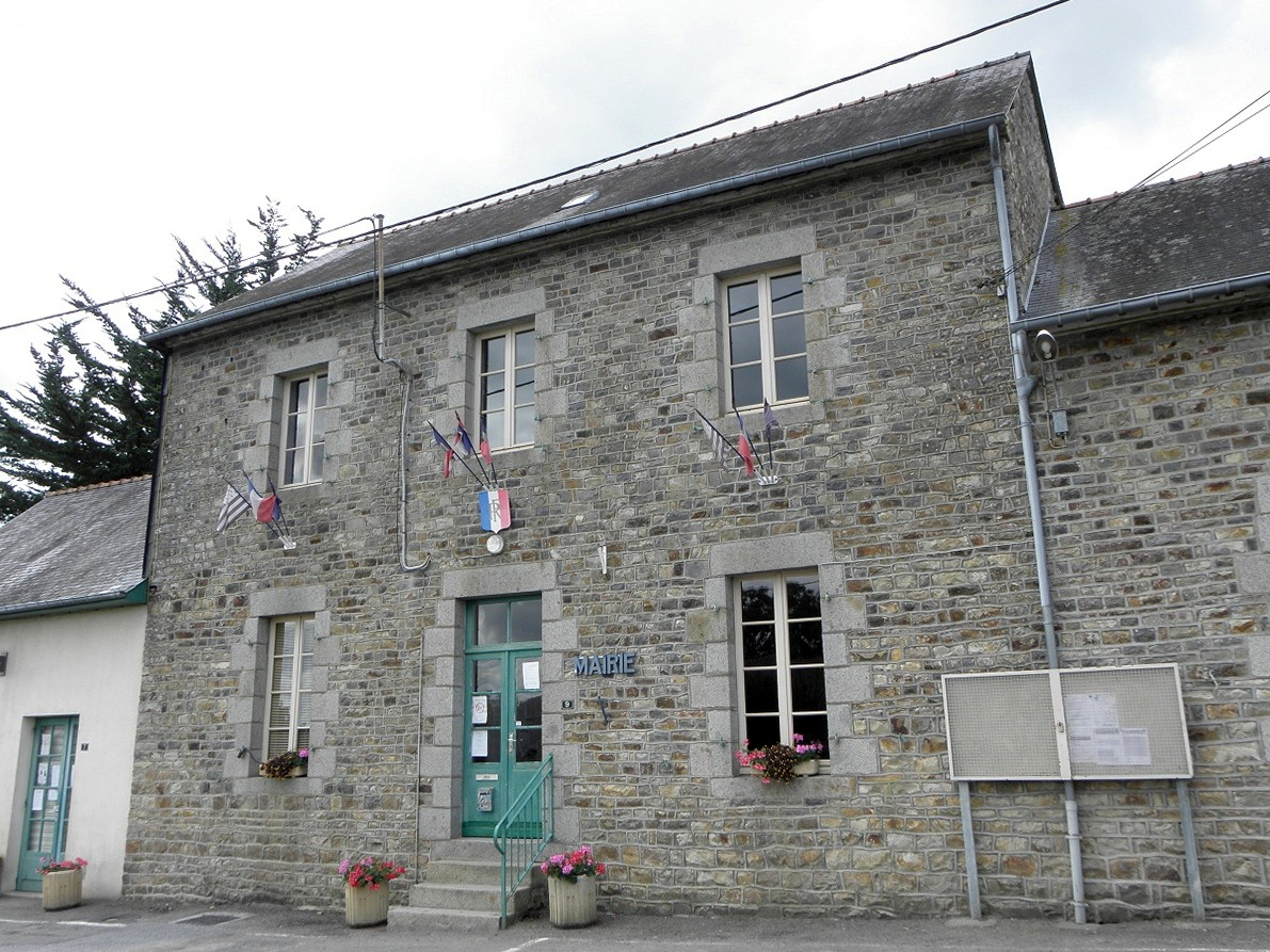 Mairie de Princé (35).